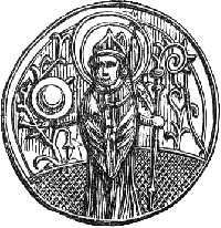 Image de Saint Honoré Saint, patron des boulangers